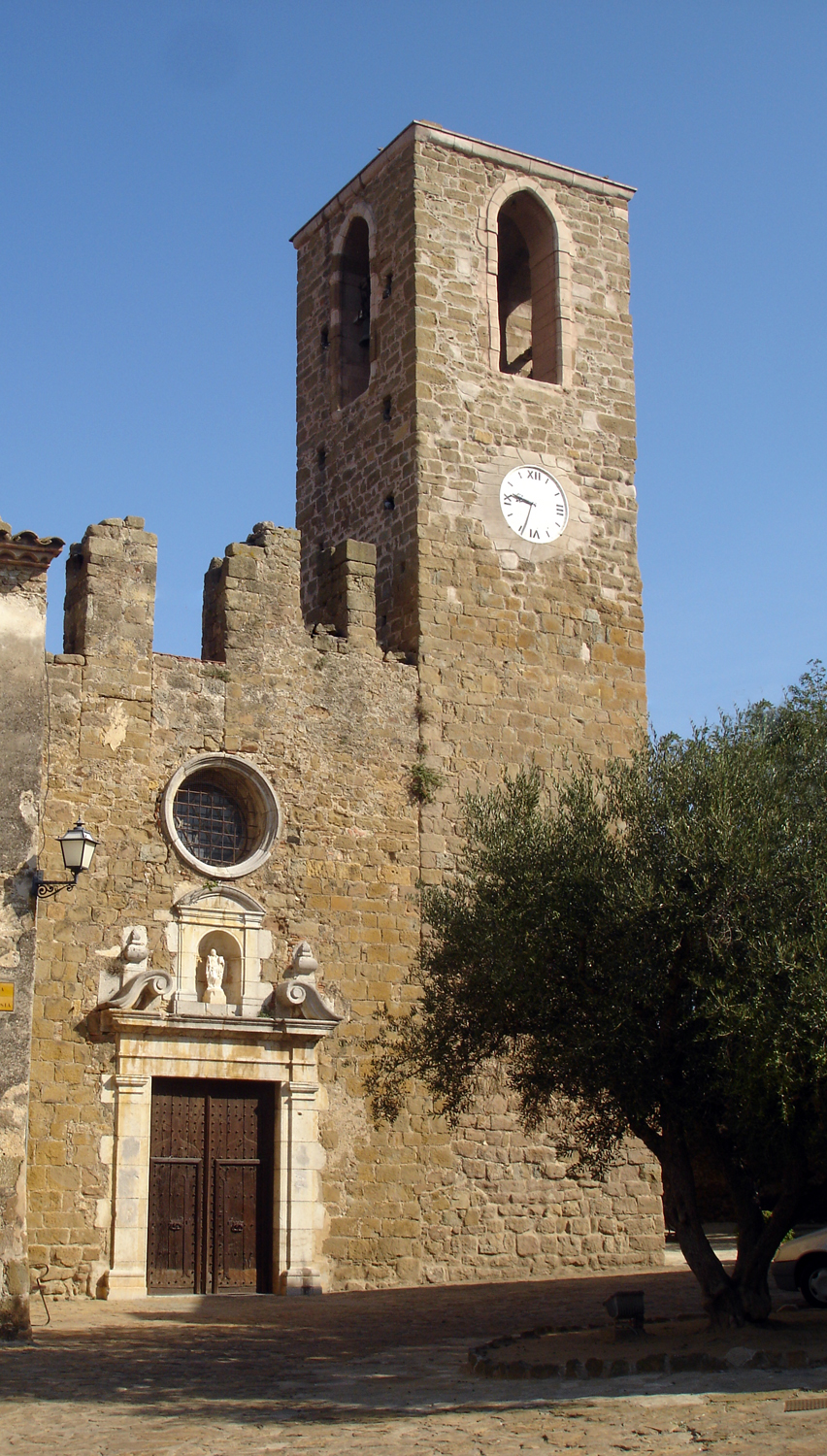 Esglèsia de Santa Eulàlia d'Ultramort (Girona, Catalunya, Espanya)